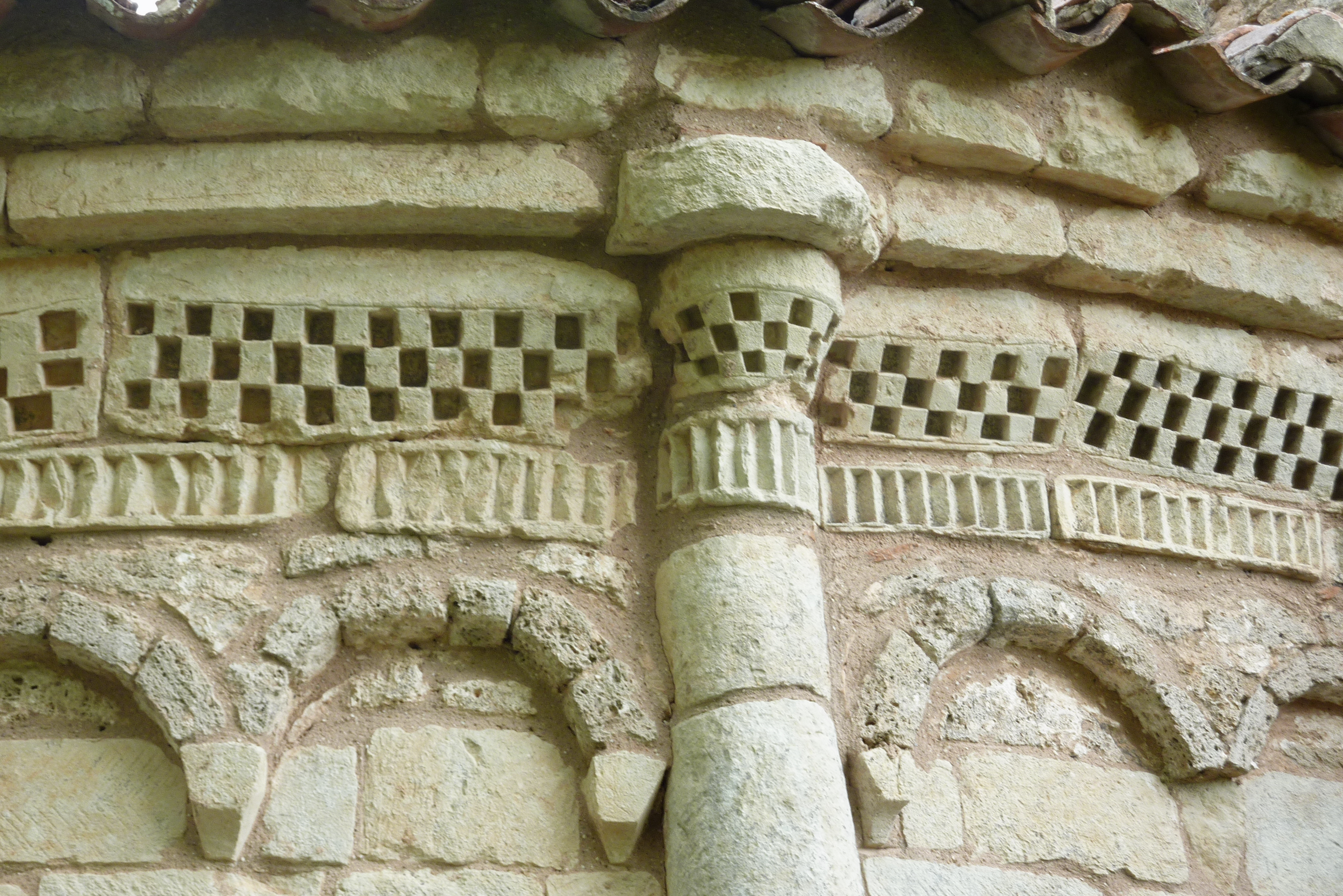 Ermita de San Pelayo in Perazancas de Ojeda, einem Ortsteil von Cervera de Pisuerga in der Provinz Palencia (Kastilien-León/Spanien), Blendarkaden der Apsis, Schachbrett- und Zahnfries